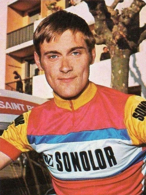 FIGURINA PANINI CAMPIONI DELLO SPORT ANNO 1973/74 N. 166 CICLISMO HEZARD